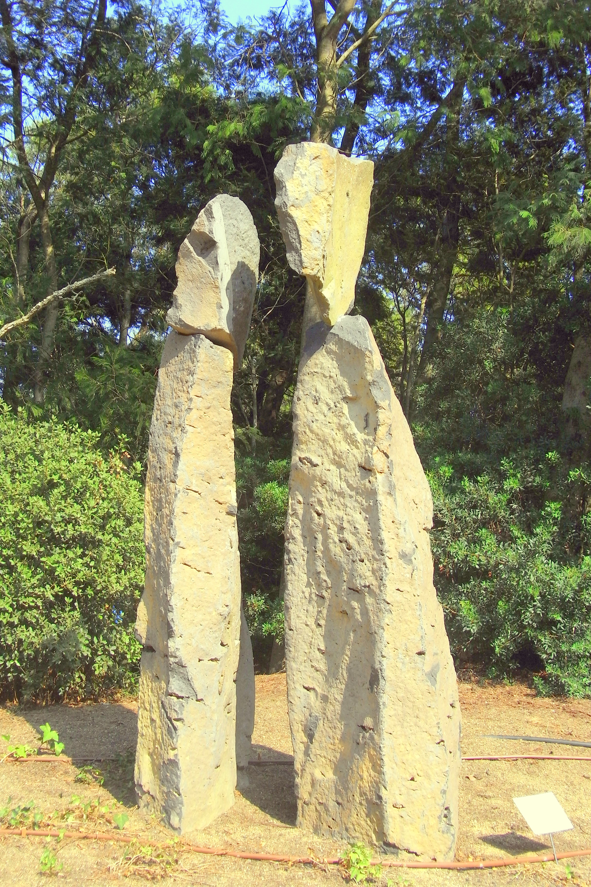 CALELLA de PALAFRUGELL . Jardí de Cap Roig "2 ARTISTES FLAMENQUES" 2003 Xavier Corberó (Barcelona 1935) Pedra de basalt 265 x 120 x 140 cm